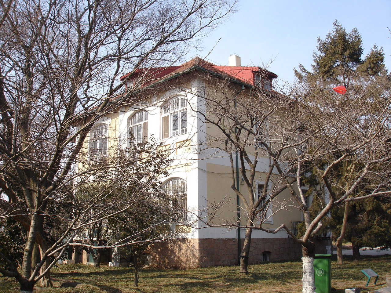 青岛中山公园林业局二号房旧址